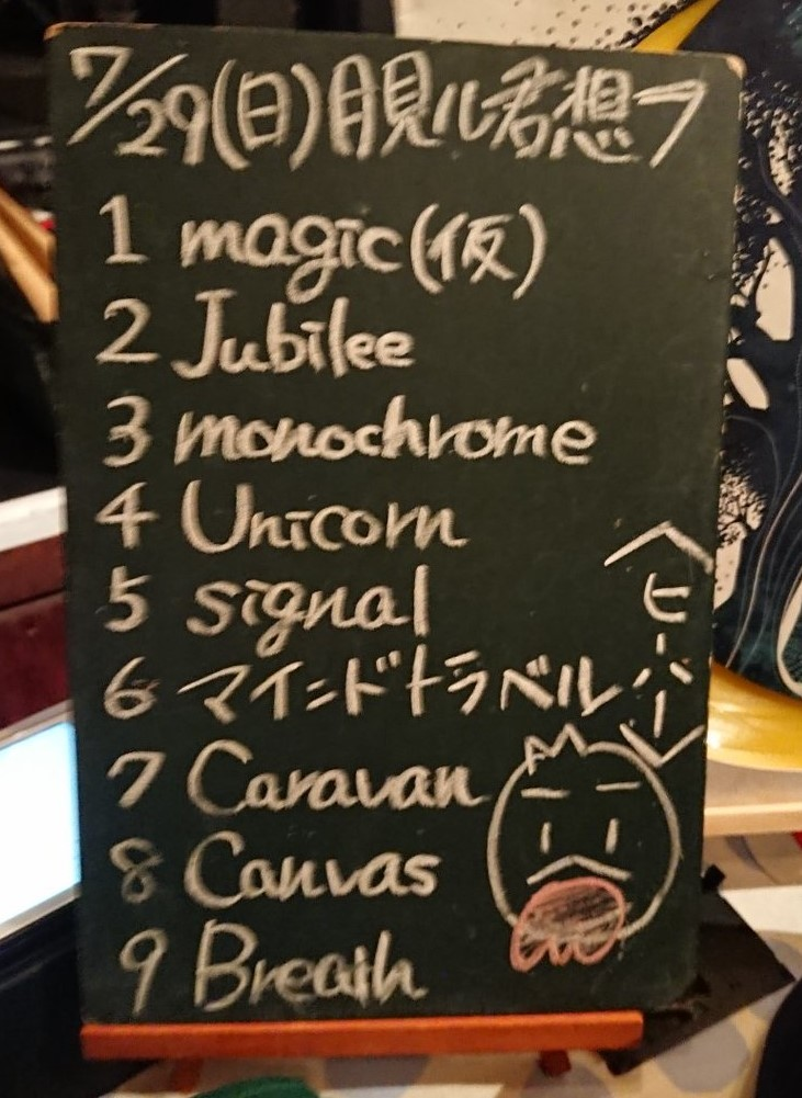 amiinAセトリボード(20180729(1))